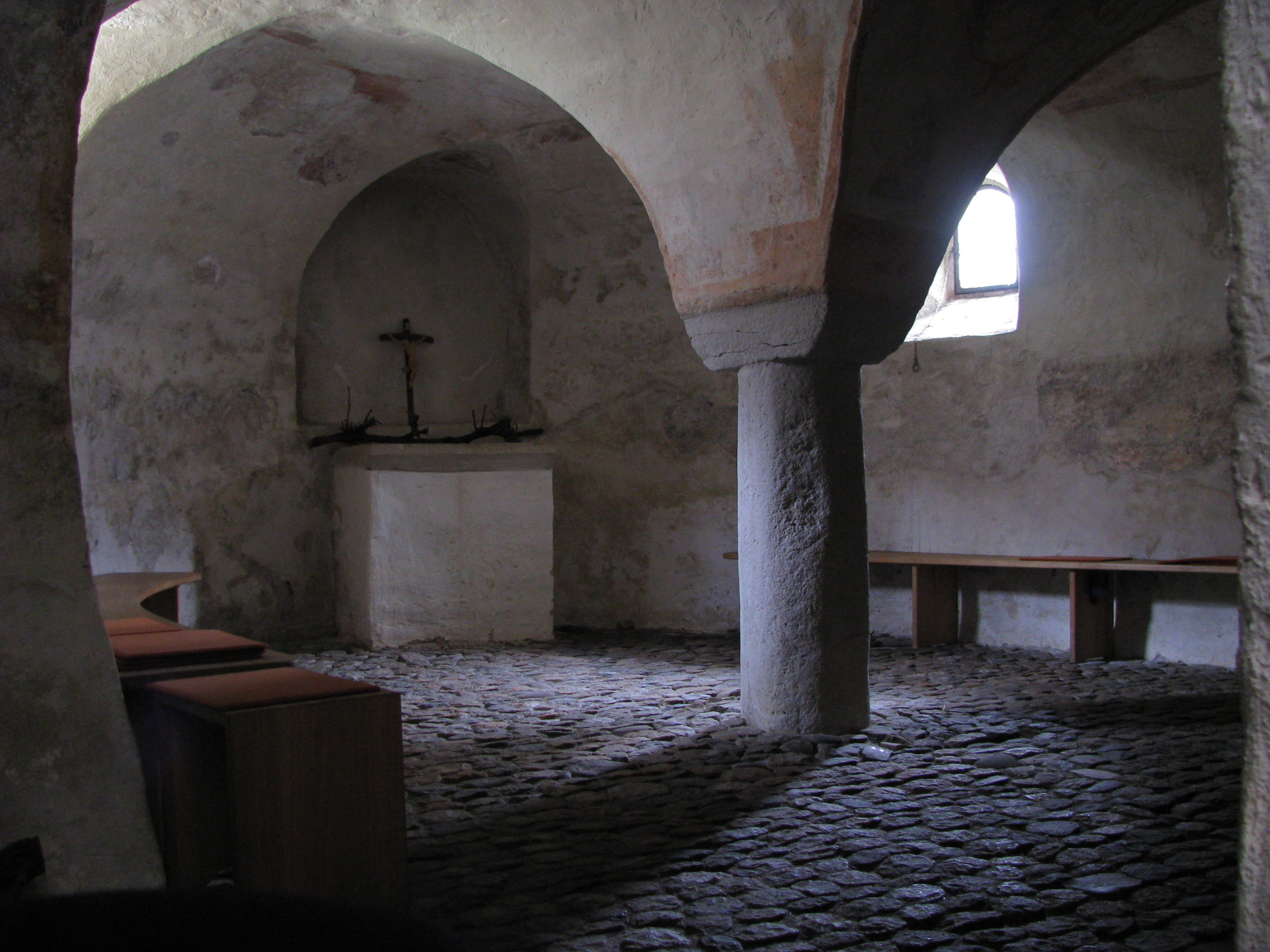 Krypta der Kirche St. Cyriak (Sulzburg)